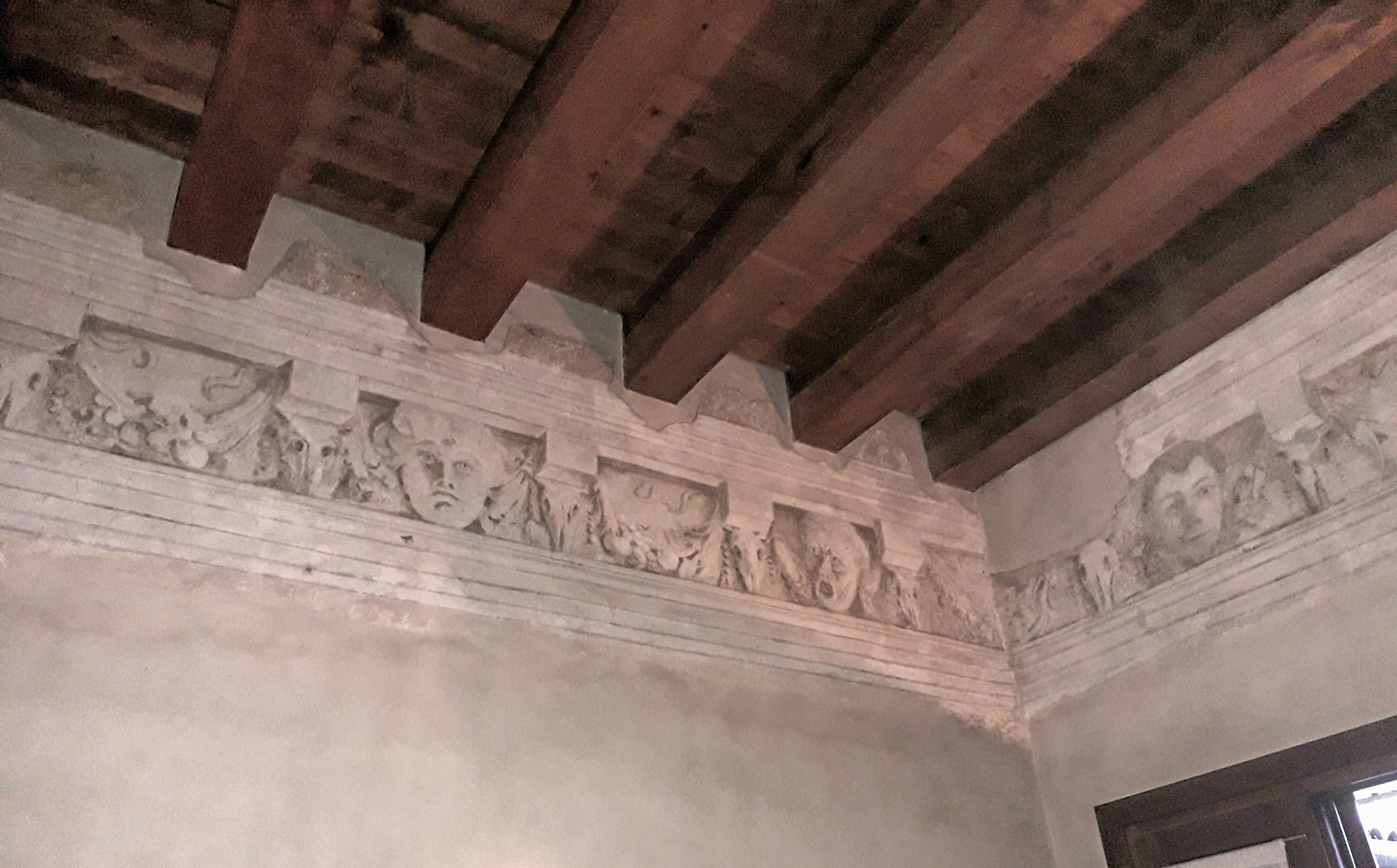 Affreschi del '500 attribuibili alla Bottega di Alessandro Maganza; villa Gonzato a Pozzoleone (Vi).